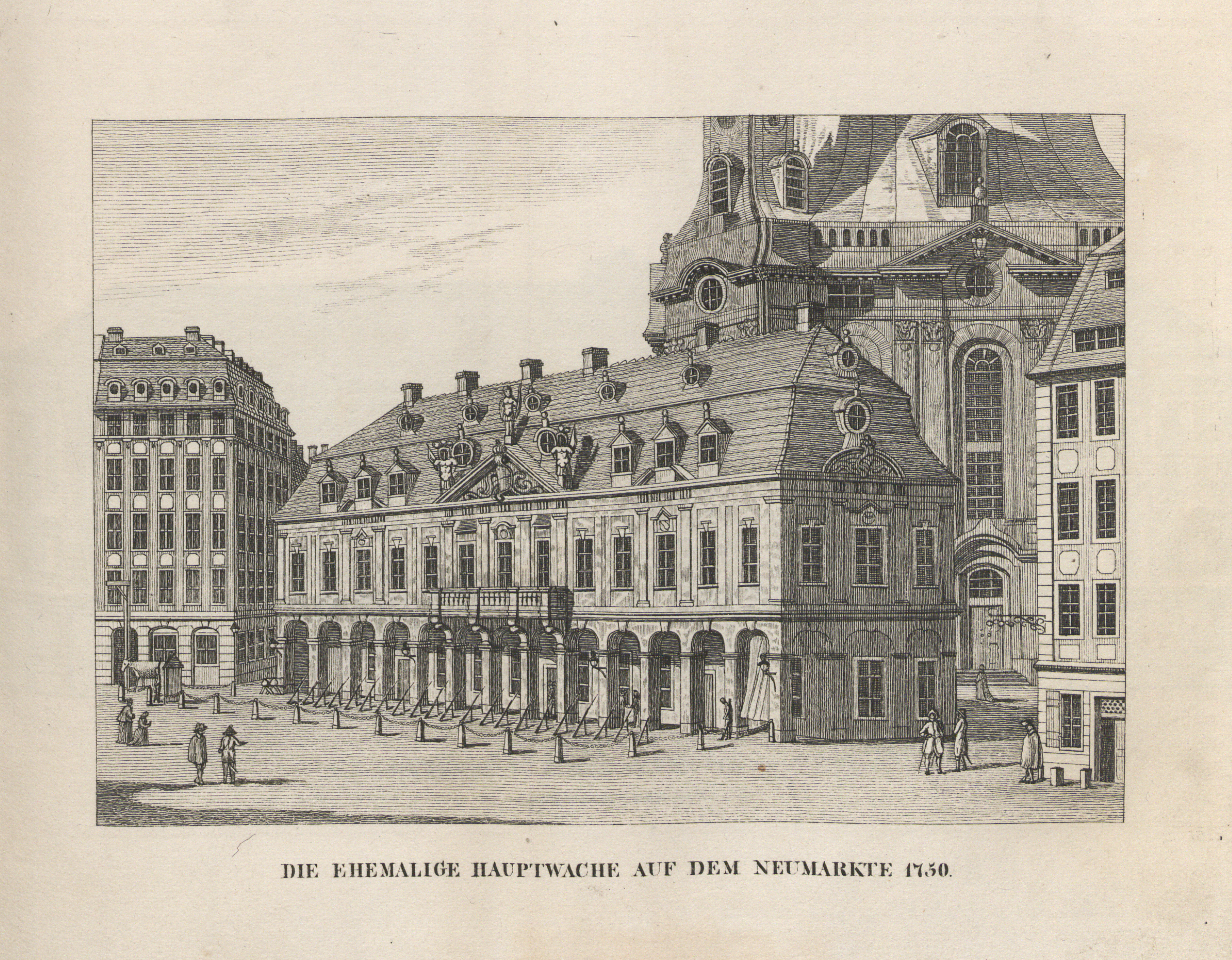 siehe Bildbeschreibung aus: Abbildungen von Dresdens alten und neuen Pracht-Gebäuden, Volks- und Hof-Festen. Untertitel: Kupferheft zur Chronik der Kgl. Sächs. Residenz-Stadt Dresden und des Sammlers für Geschichte und Alterthum, Kunst und Natur im Elbthale. Grimmer, Dresden 1835